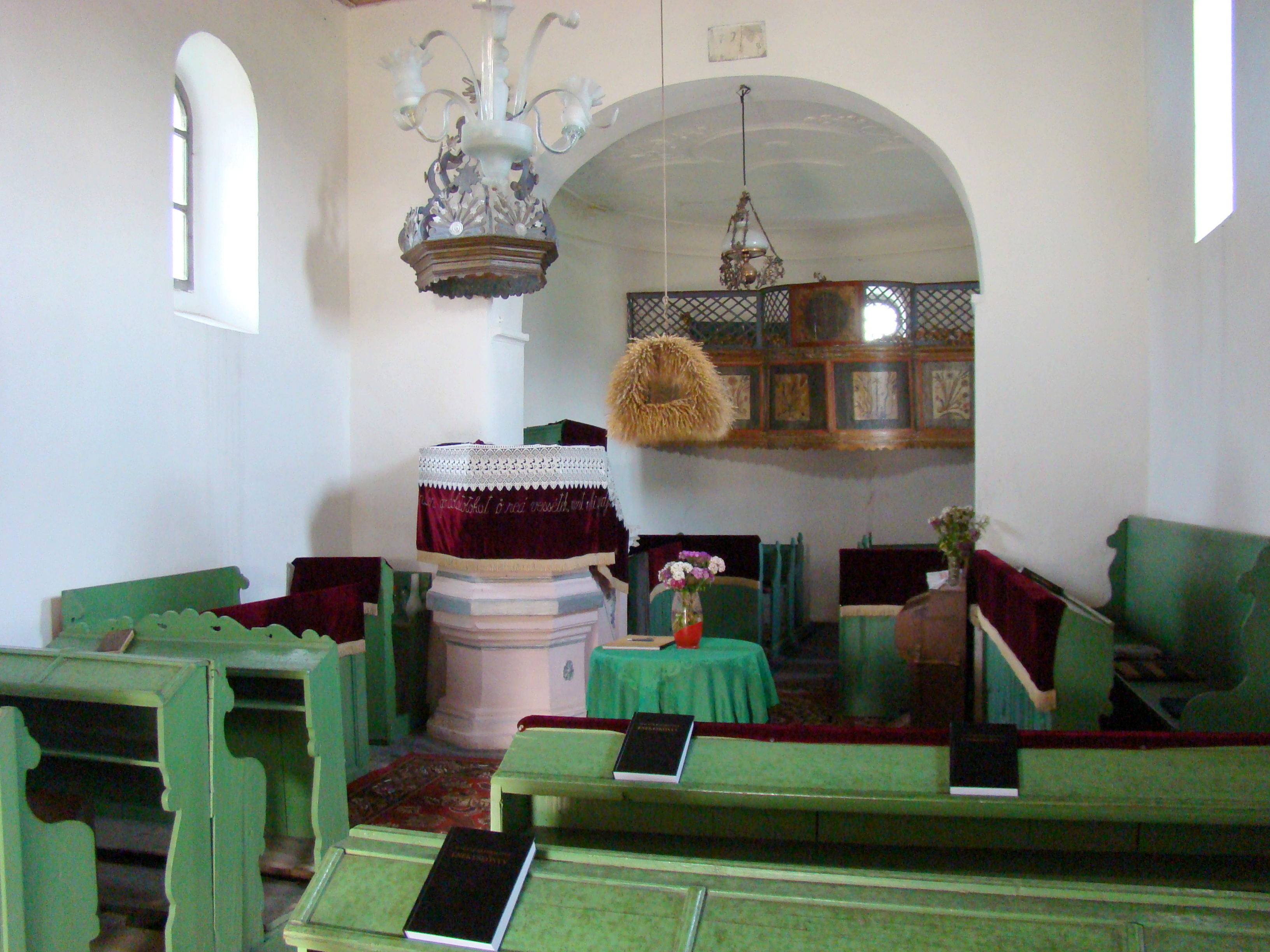 Biserica reformată, sat Rădești; comuna Rădești, județul Alba